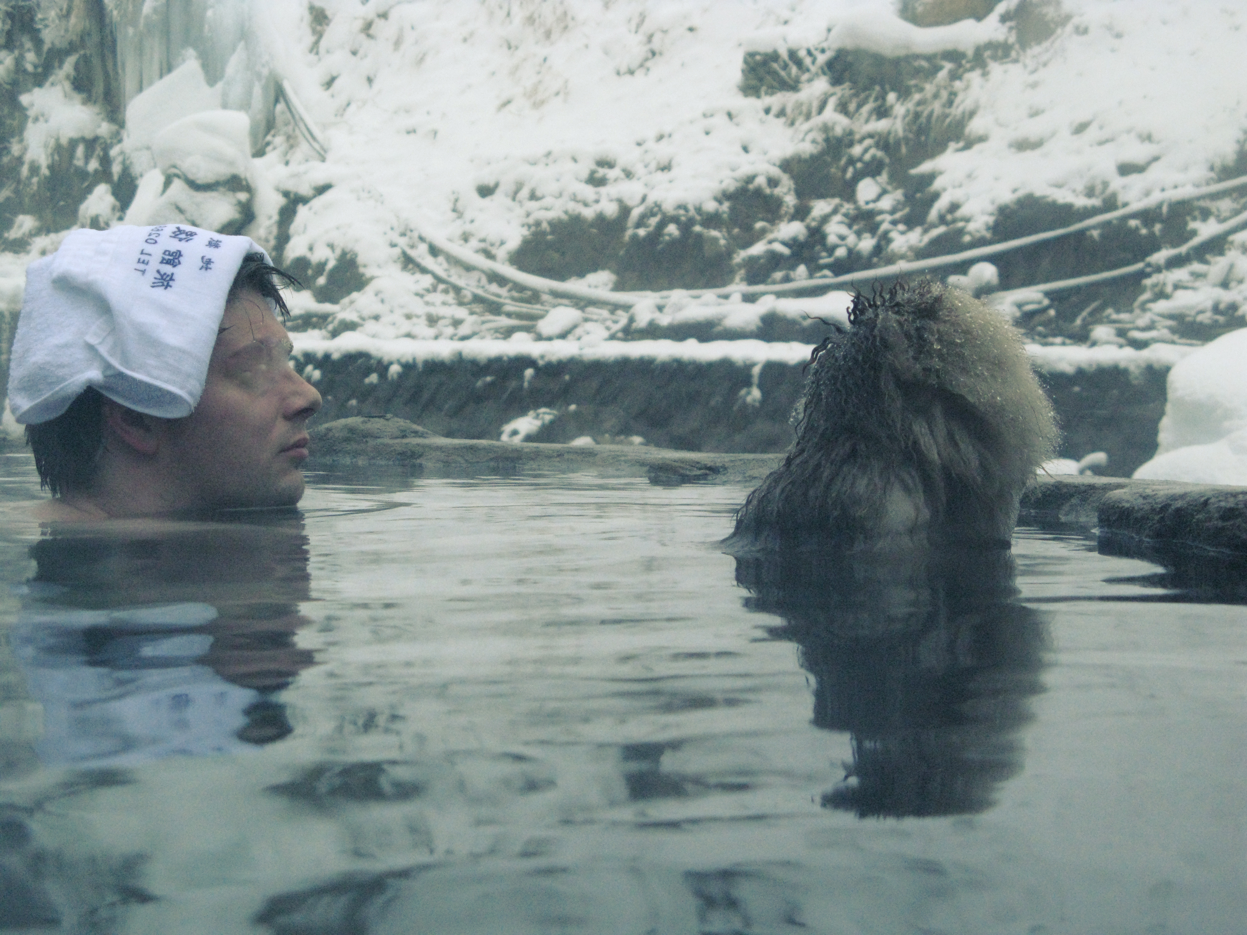 File:Onsen with monkey Jigokudani.jpgをSoica2001 (talk)が目線ぼかし加工。